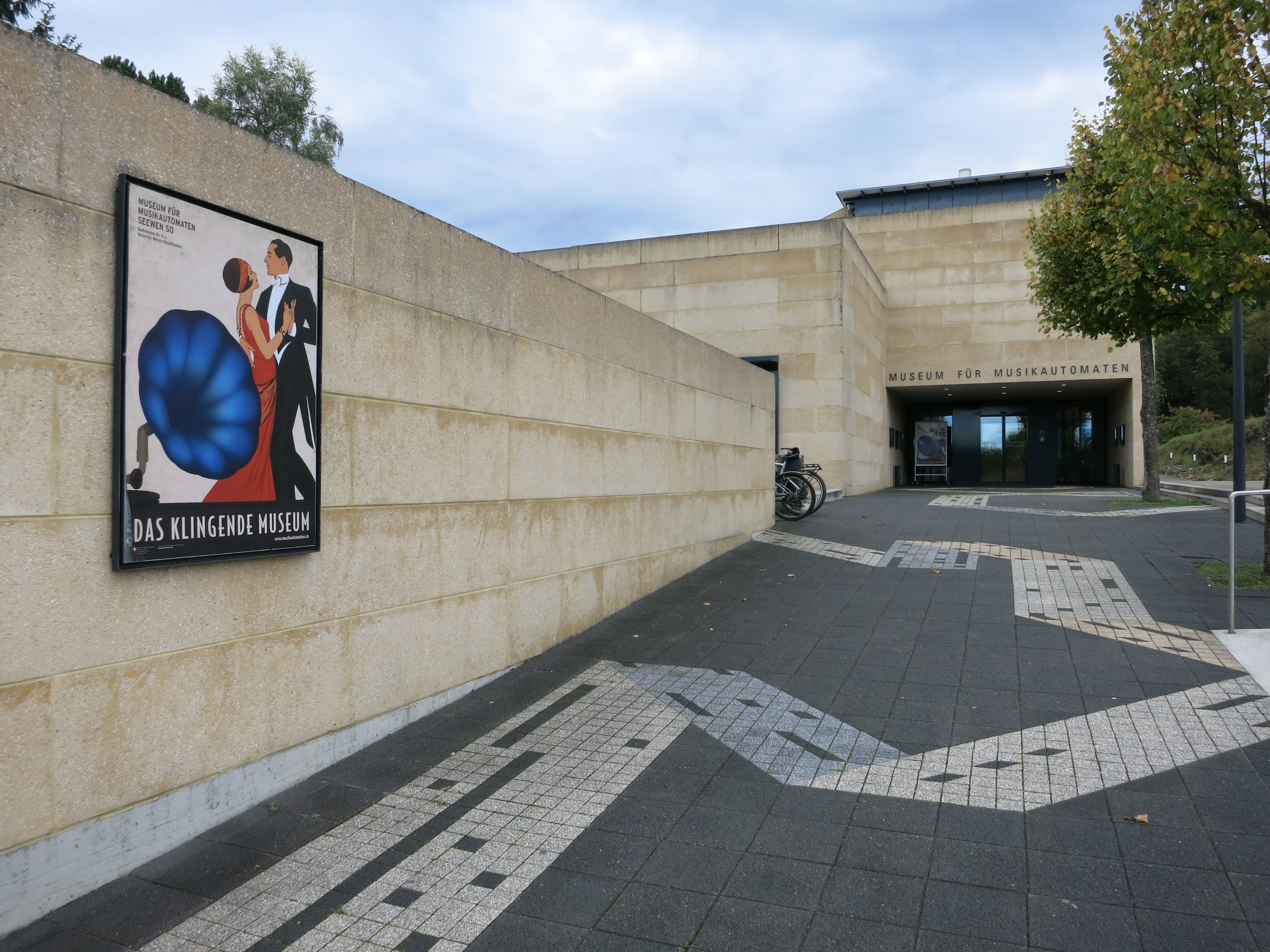 Museum für Musikautomaten, Seewen SO, Schweiz – Lochstreifen-Grafik im Pflaster des Vorplatzes